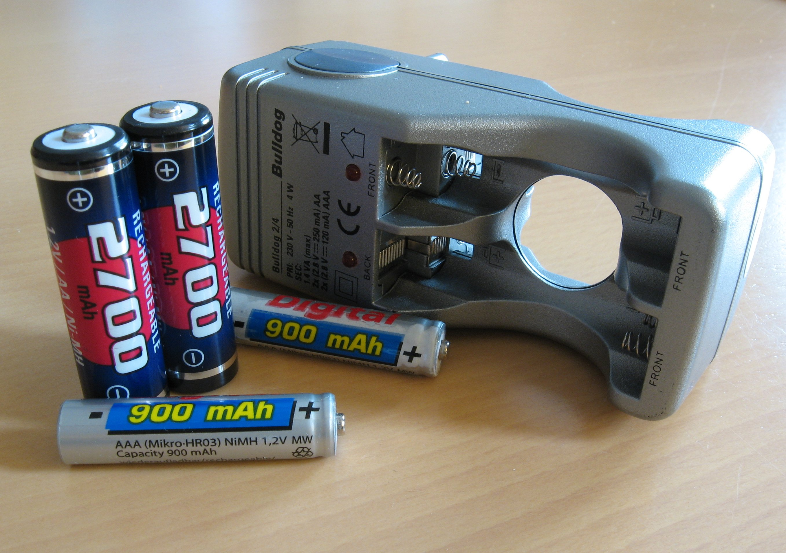 Desc-en: Nickel metal hydride batteries Desc-es: Cargador y pilas de níquel e hidruro metálico.